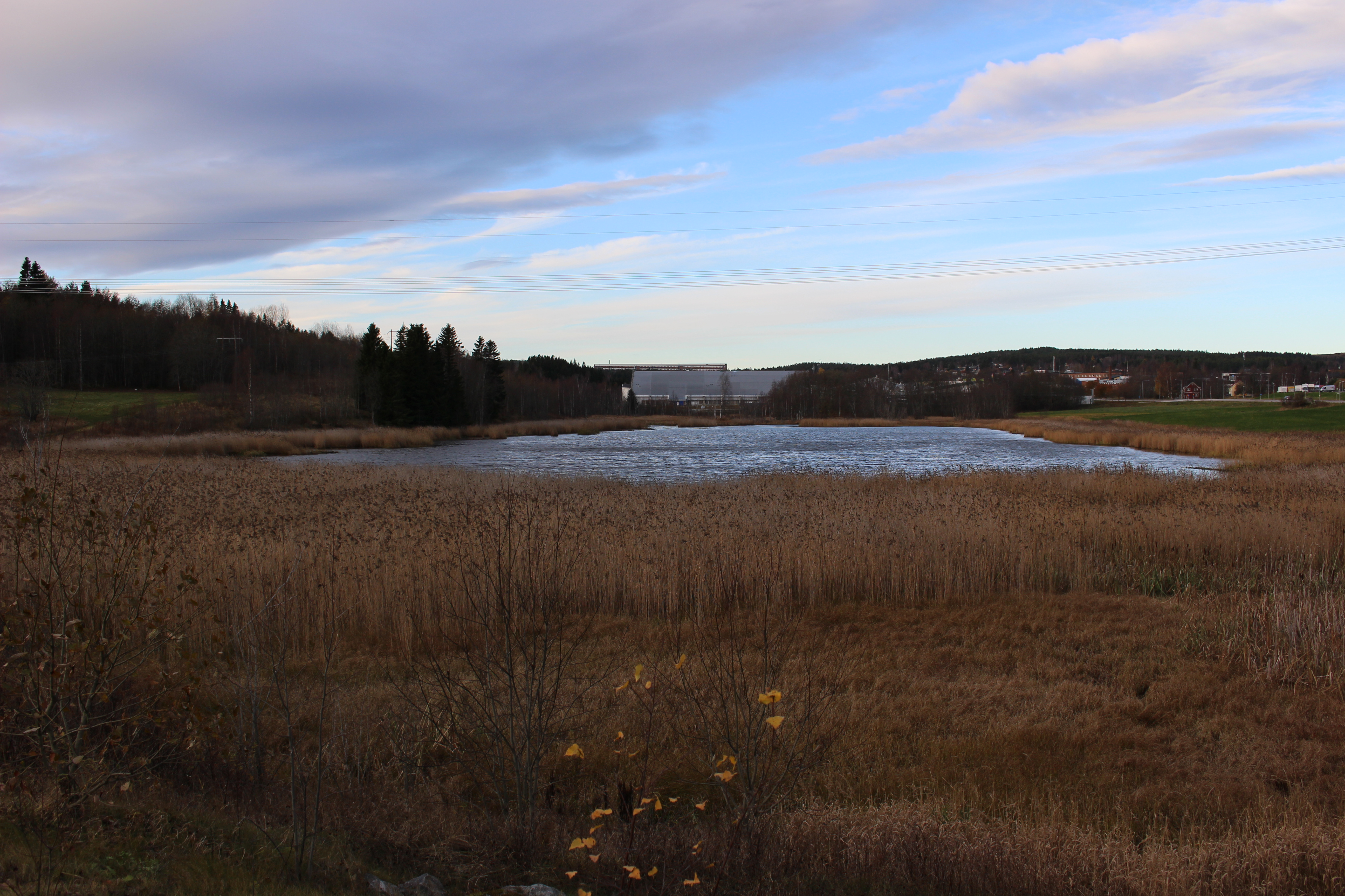 Gärdetjärnen från öster.